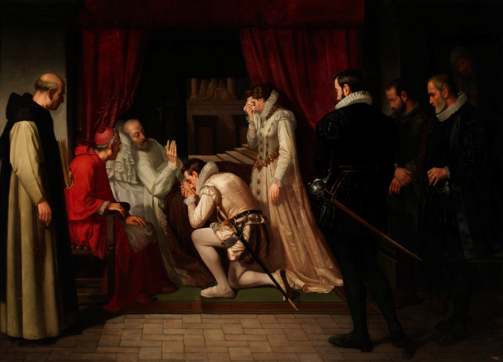 La obra representa los últimos momentos del rey Felipe II de España (1527-1598), que aparece bendiciendo a su hijo, el futuro rey Felipe III de España, y en presencia de la infanta Isabel Clara Eugenia.